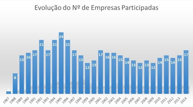 Gráfico das participadas da AITEC